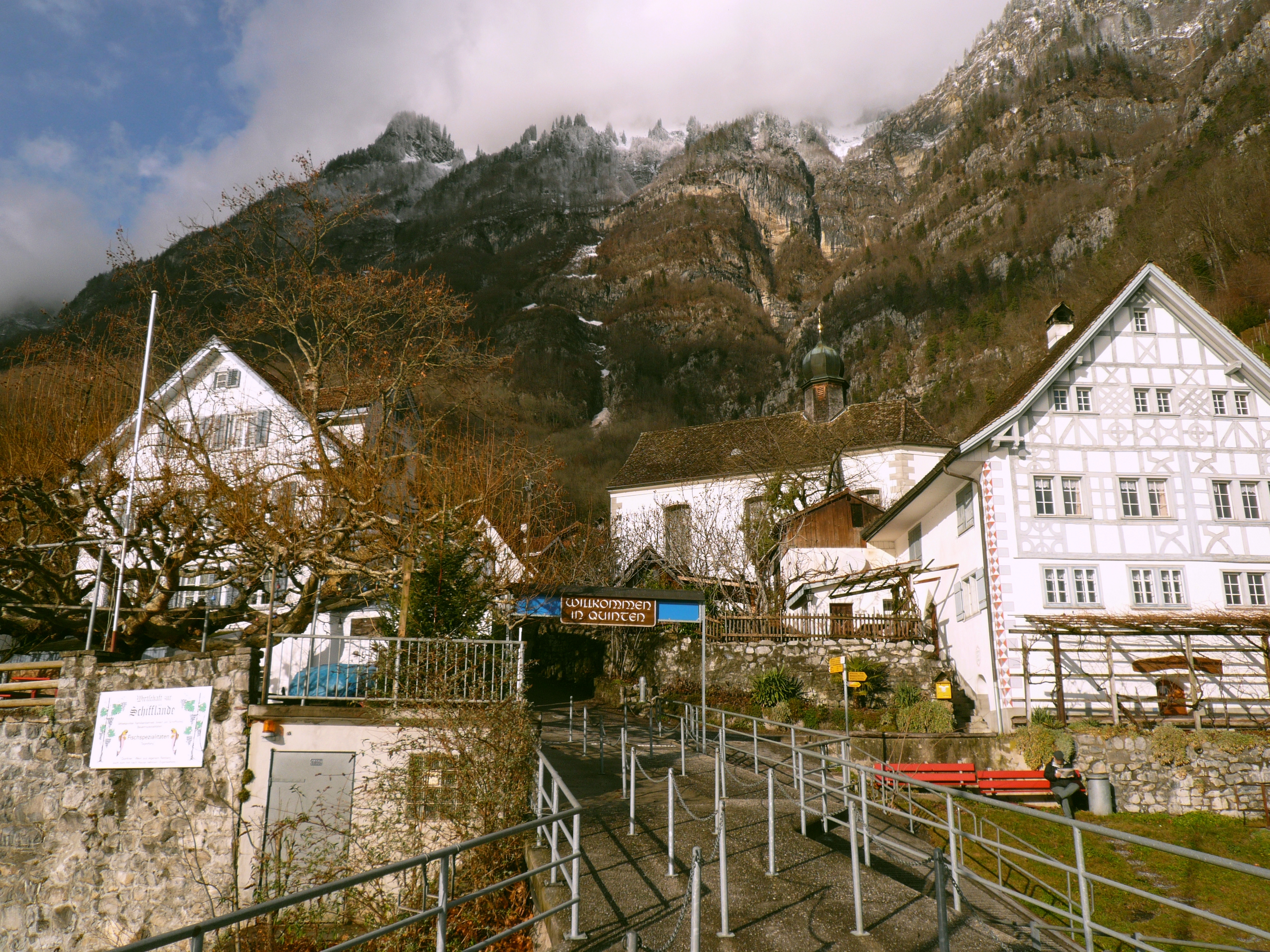 Quinten, Switzerland